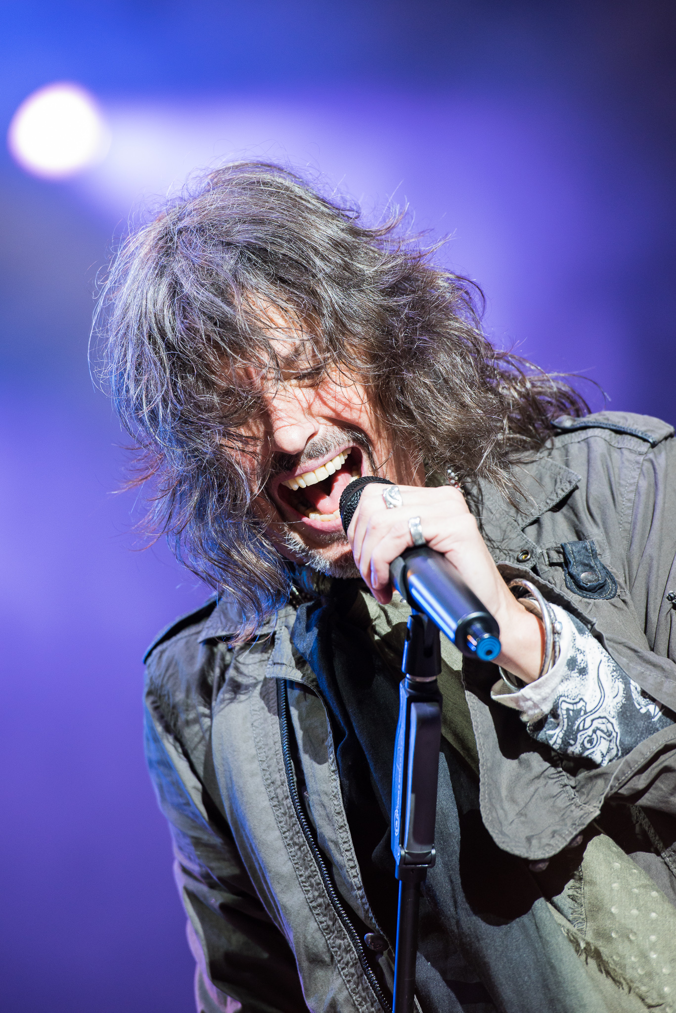 Brombachsee,Concertbüro Franken,Festival,Foreigner,Kelly Hansen,Konzert,Lieder am See,Livekonzert,Livemusik,Musik